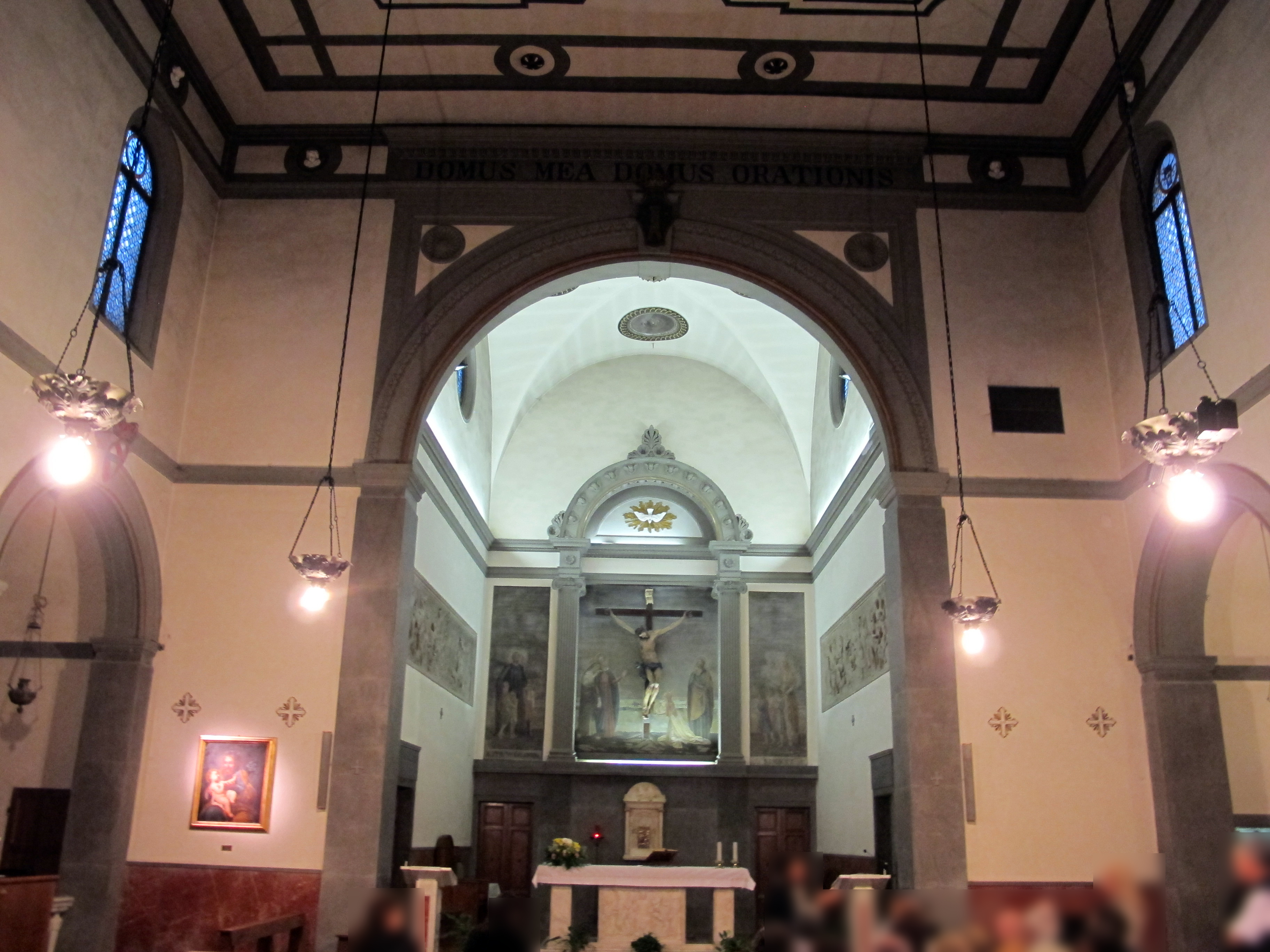 Santa Lucia sul Prato, Firenze - Interno